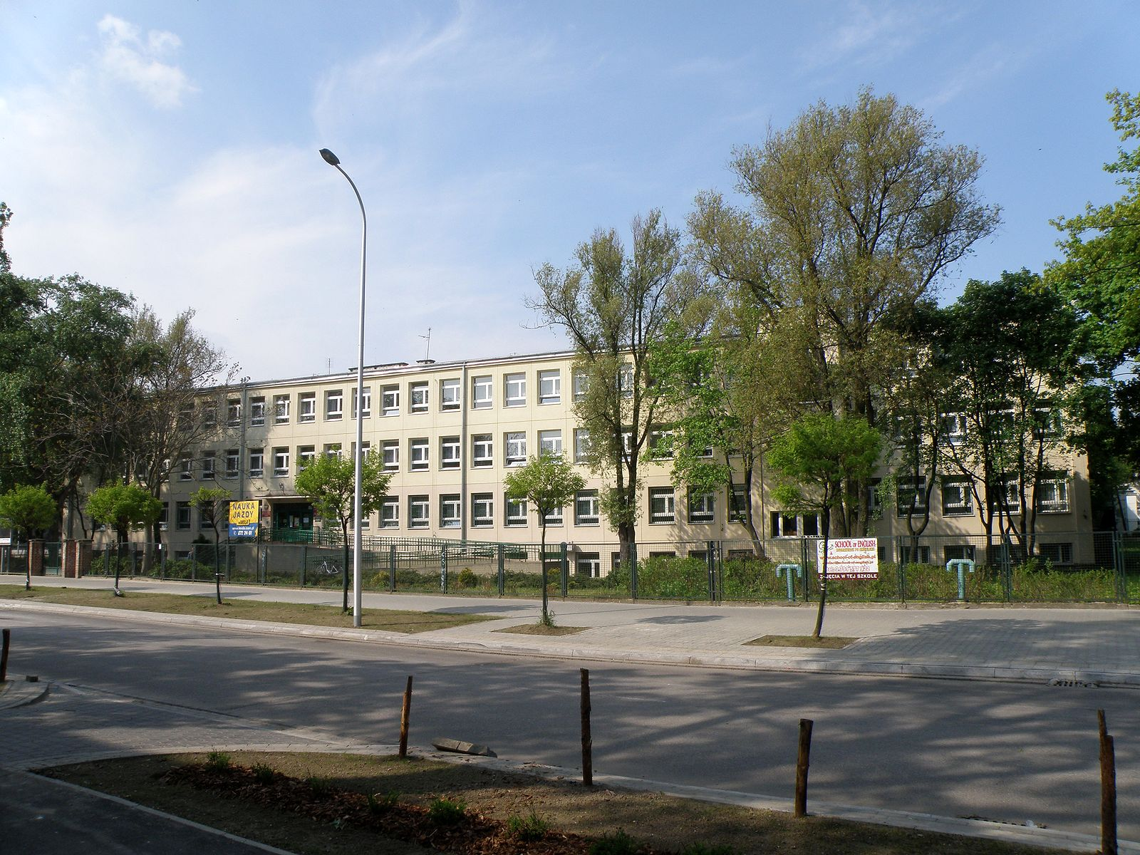 Szkoła Podstawowa Nr 317 im. Edmunda Bojanowskiego w Warszawie